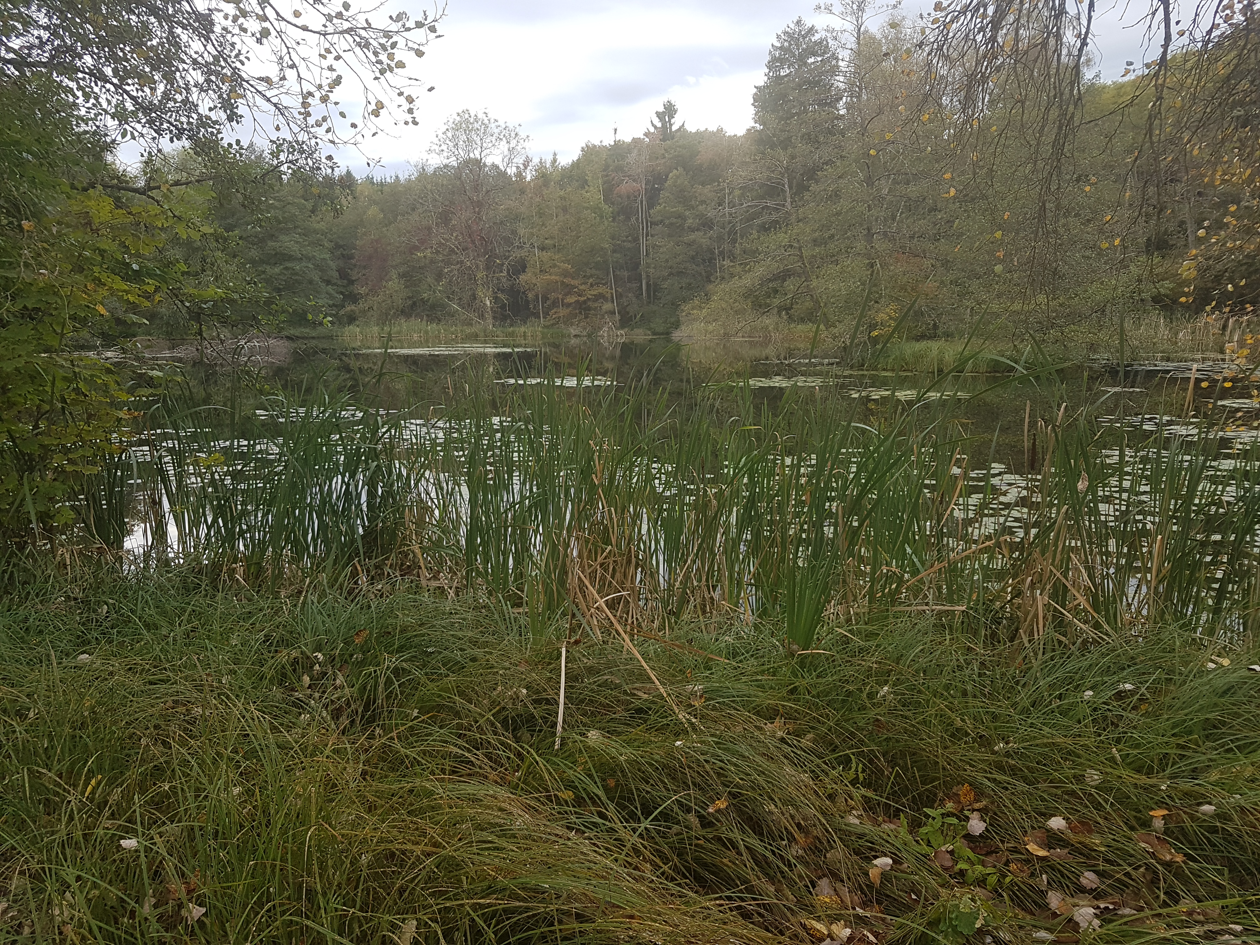 Stillgewässer, das „Moor“ bei Schloss Krastowitz, Österreich